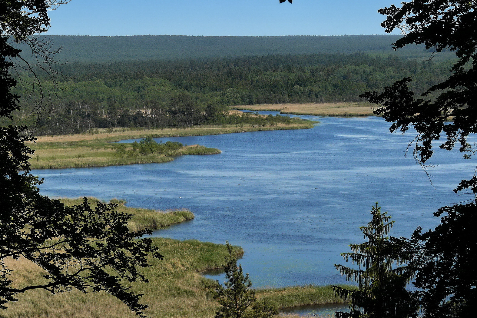 Severní zátoky Břehyňského rybníka